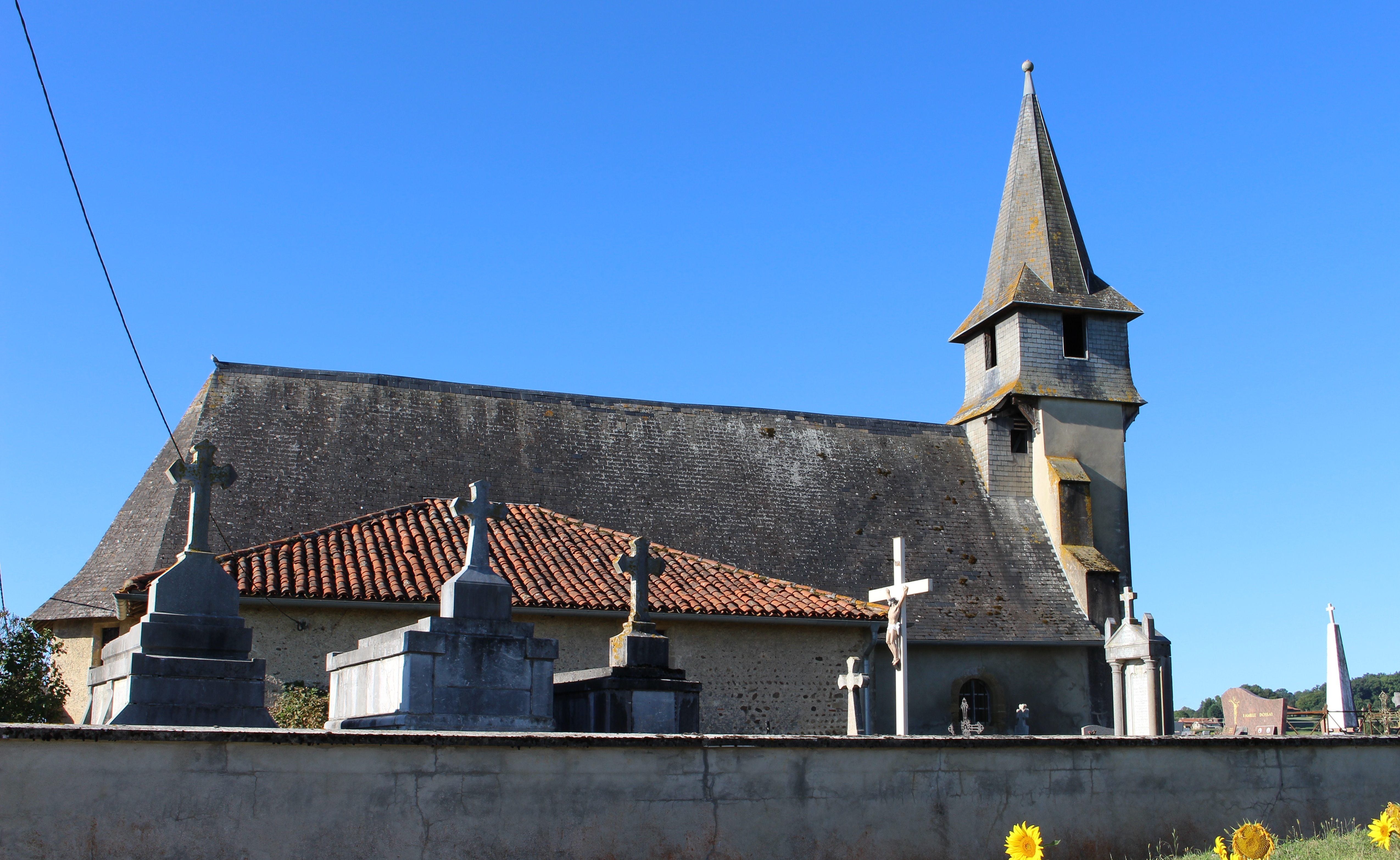 Église Notre-Dame-de-l'Assomption de La Penne (Hautes-Pyrénées)